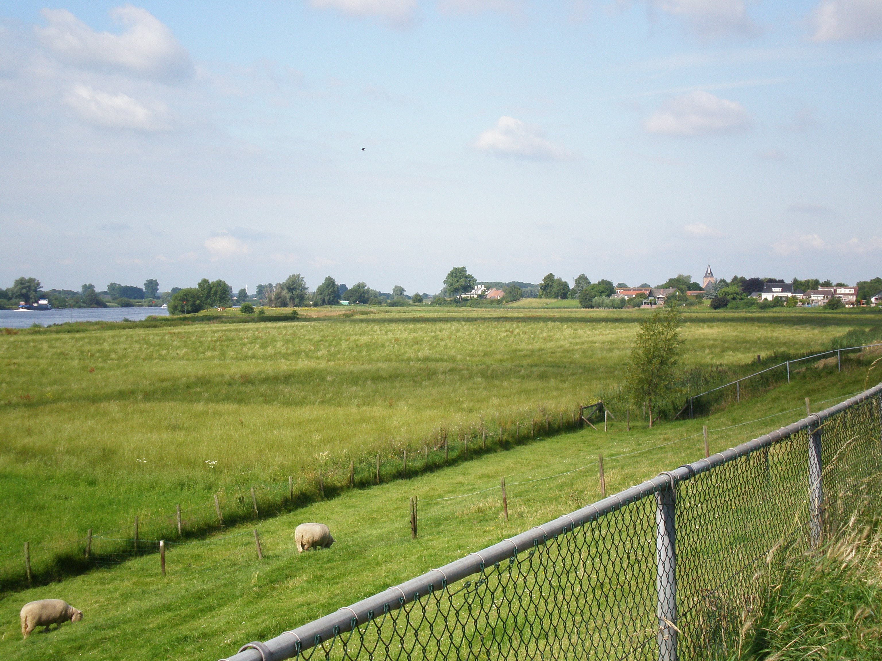 Foto van Well (Gld.) vanaf de dijk bij Ammerzoden. Gemaakt door/op Ninane 08:45, 9 July 2007 (UTC) Toestemming: GFDL